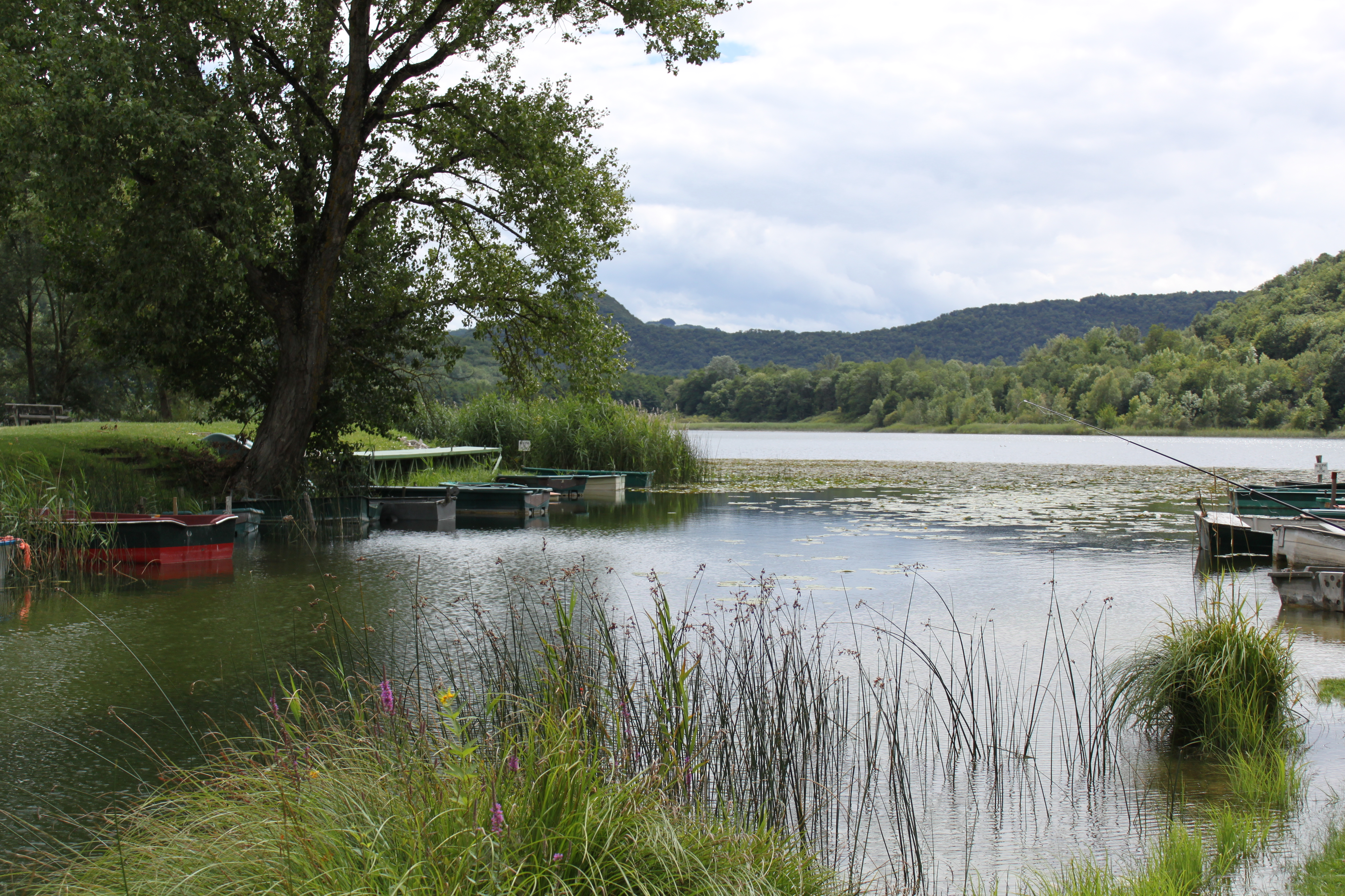 Le Lac de Barterand, sur la commune de Pollieu, dans l'Ain (France)